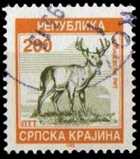 Первая почтовая марка Республики Сербская Краина